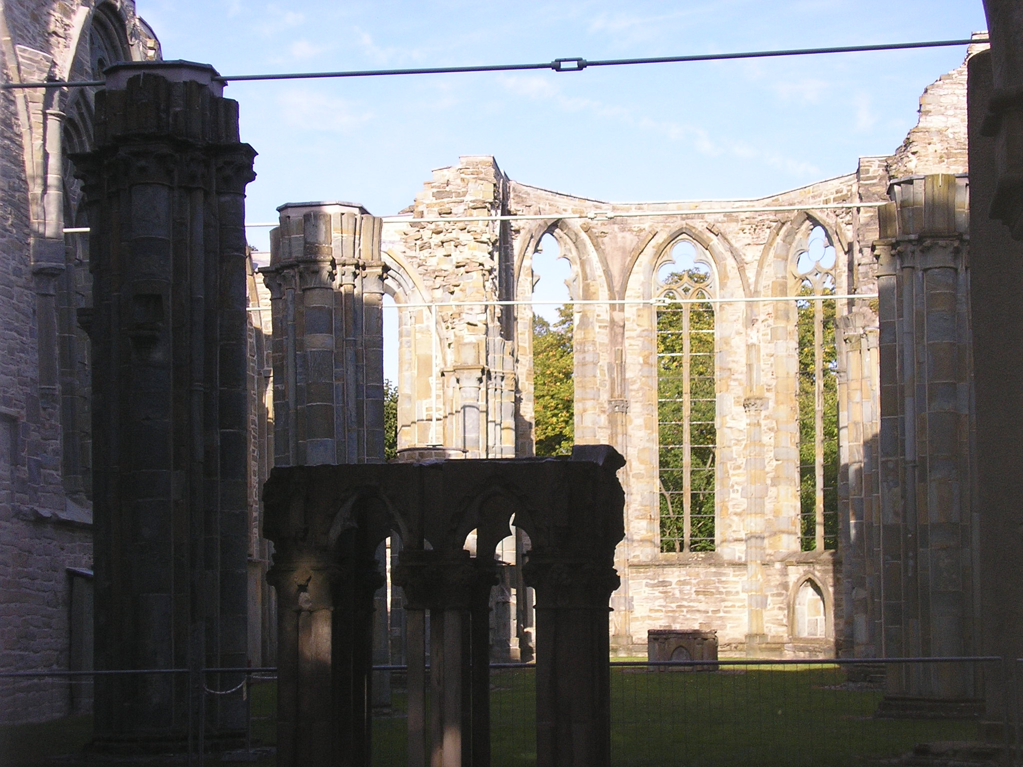 Ruine Augustinerinnenkloster zu Lippstadt